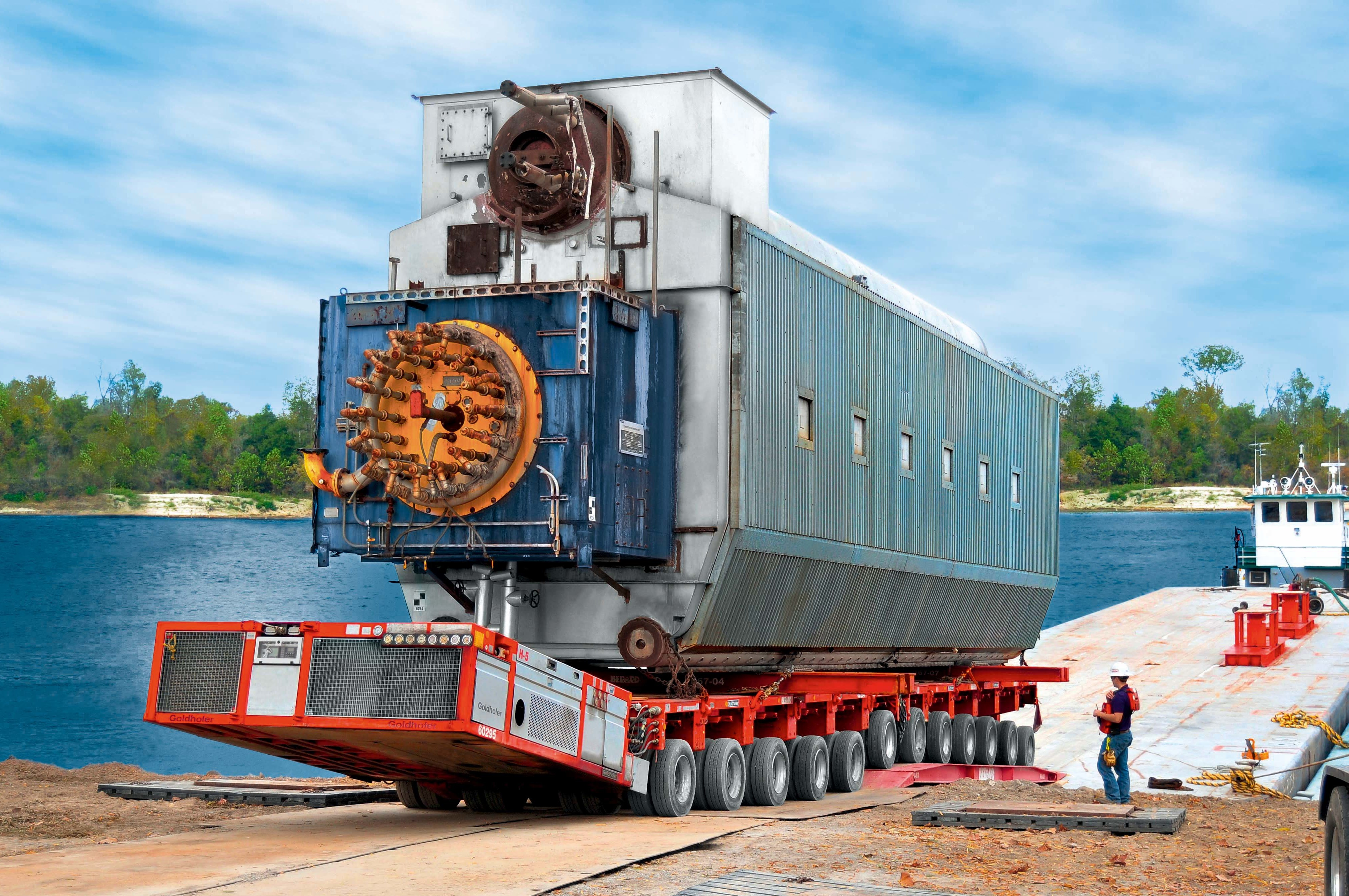 Ein PST von Goldhofer im Einsatz